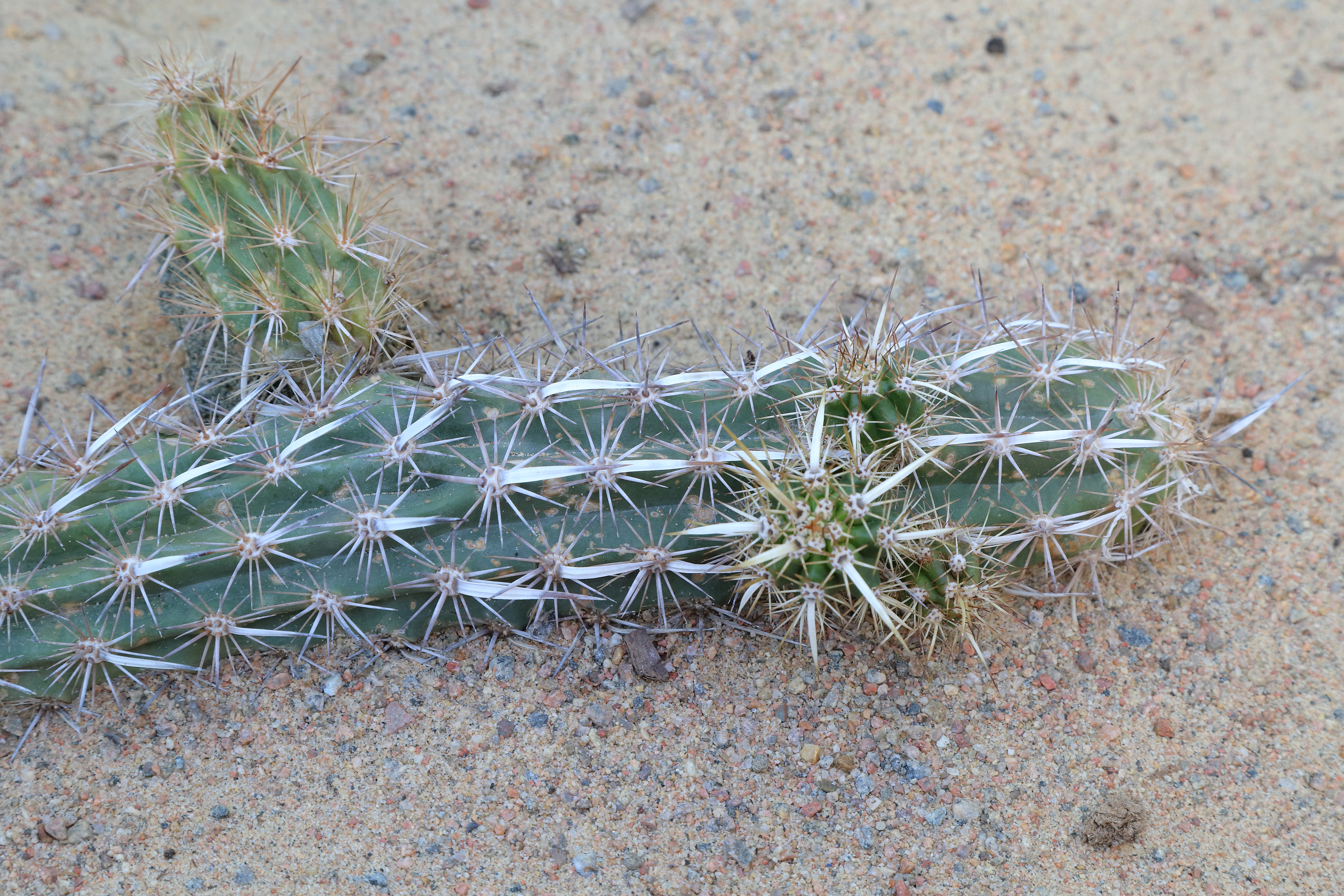 Stenocereus eruca identifierad med hjälp av skylt i Göteborgs botaniska trädgård.